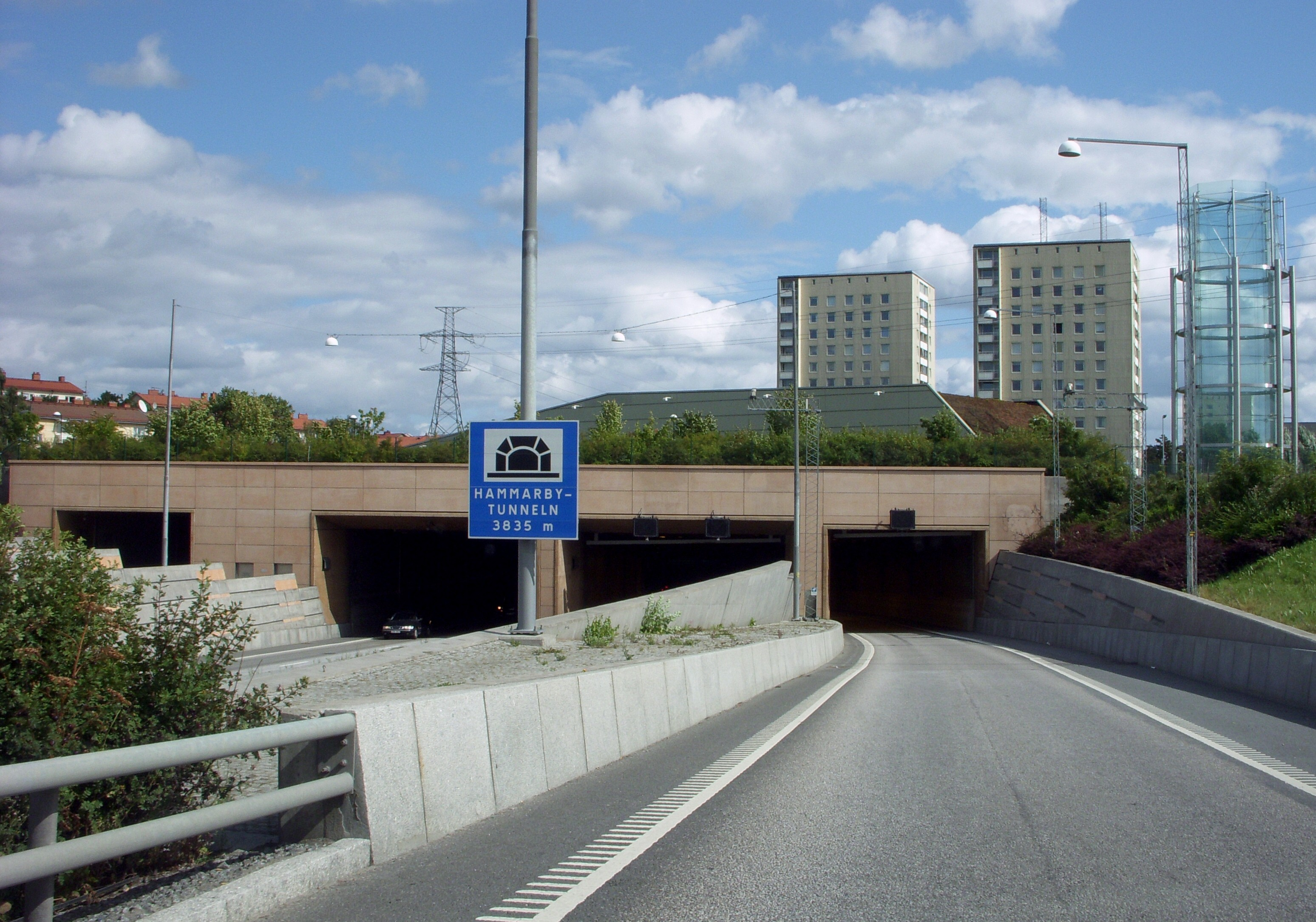 Södra länken i Stockholm, tunnelinfart till Hammarbytunneln vid Årsta